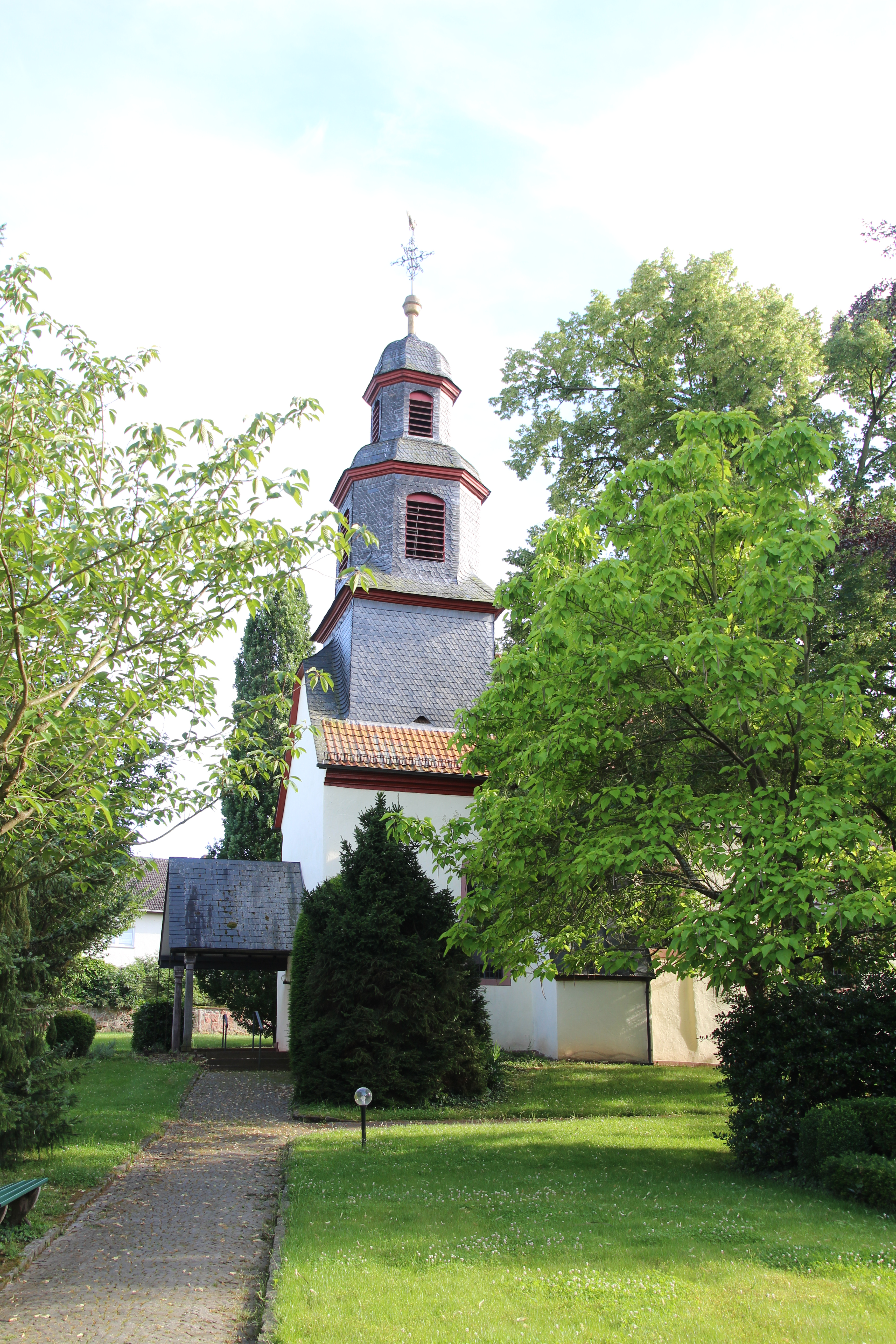 Ev. Kirche